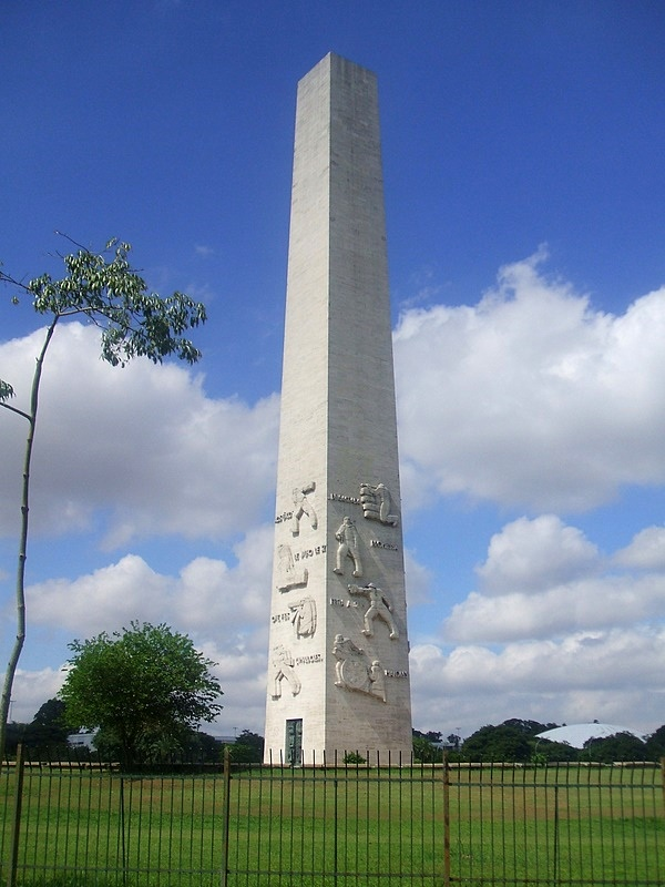 Obelisco de São Paulo, no Parque do Ibirapuera - Brasil.